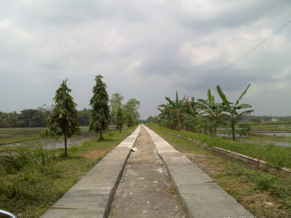 Bulak Silayur, salah satu akses ke sikambang melalui Pituruh.